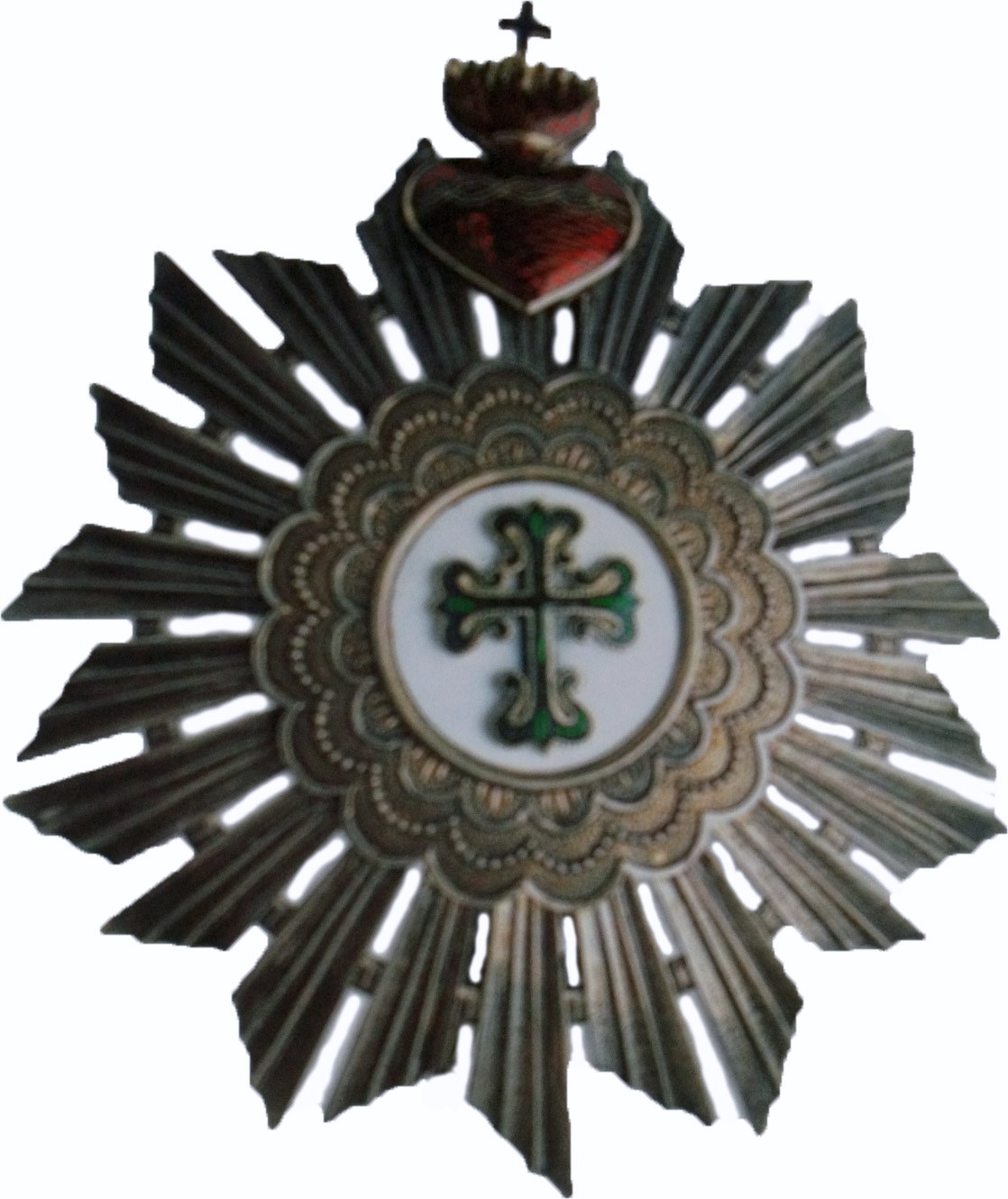 Portugal, décoration de St-Benoit_d'Aviz, plaque de poitrine de commandeur_.